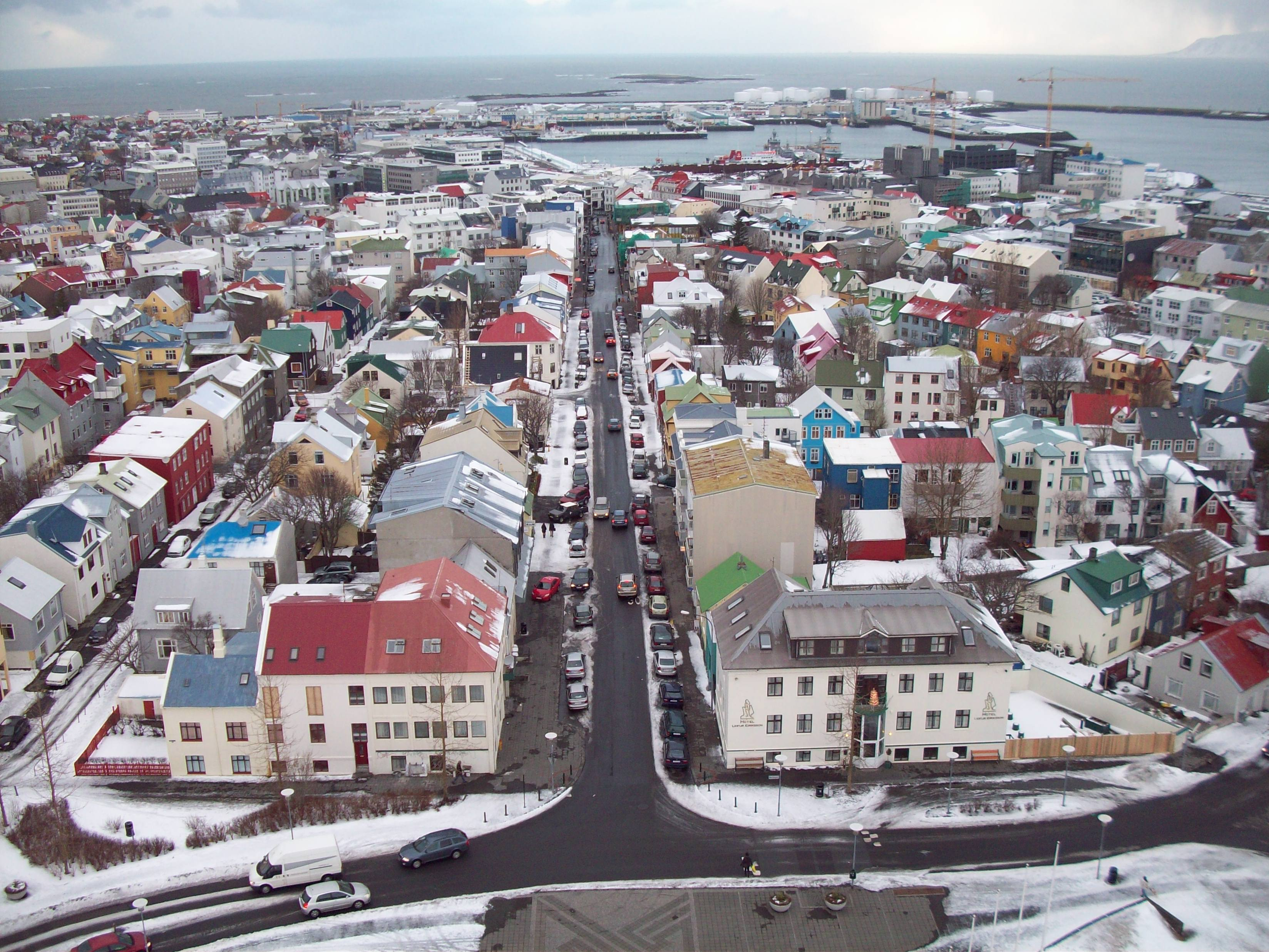 Reykjavík séð úr Hallgrímskirkjuturni